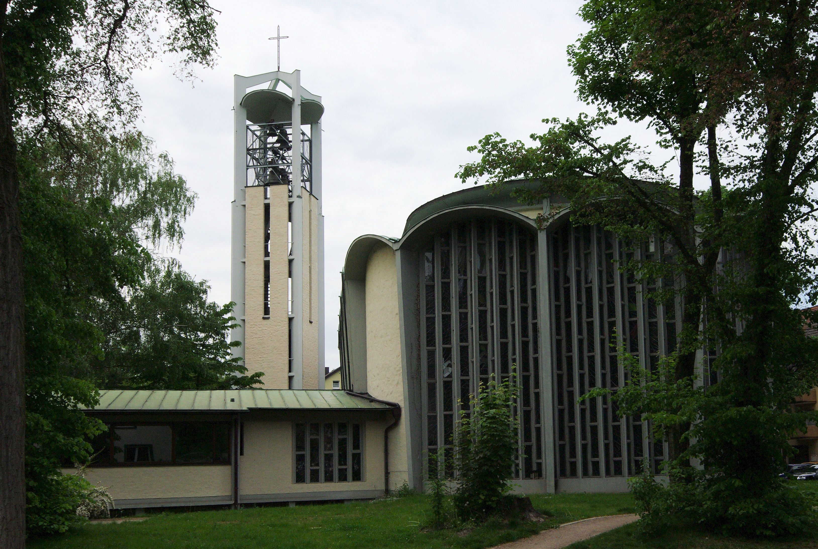 Ludwigskirche